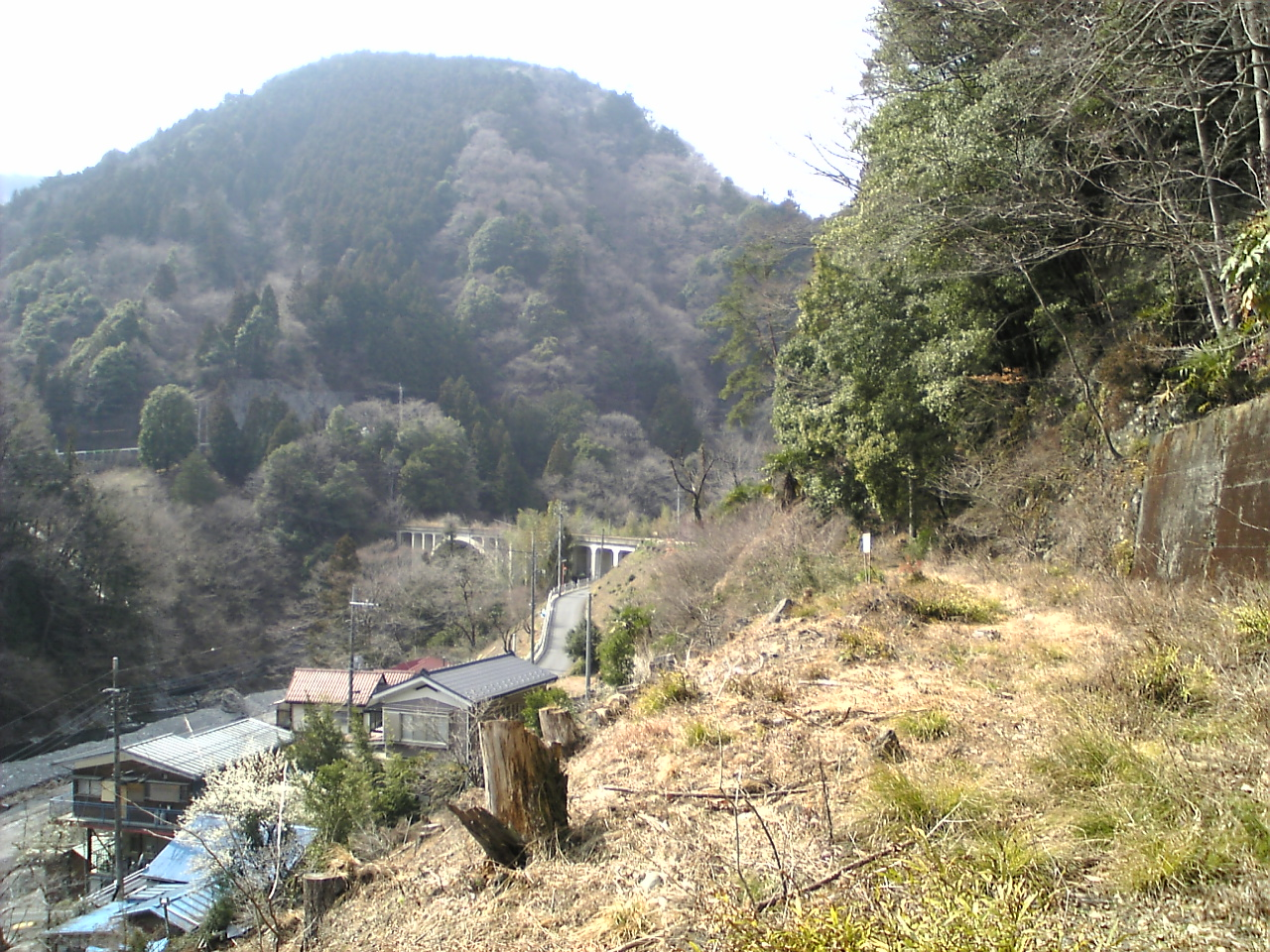 東京都水道局小河内線・日原川橋梁跡